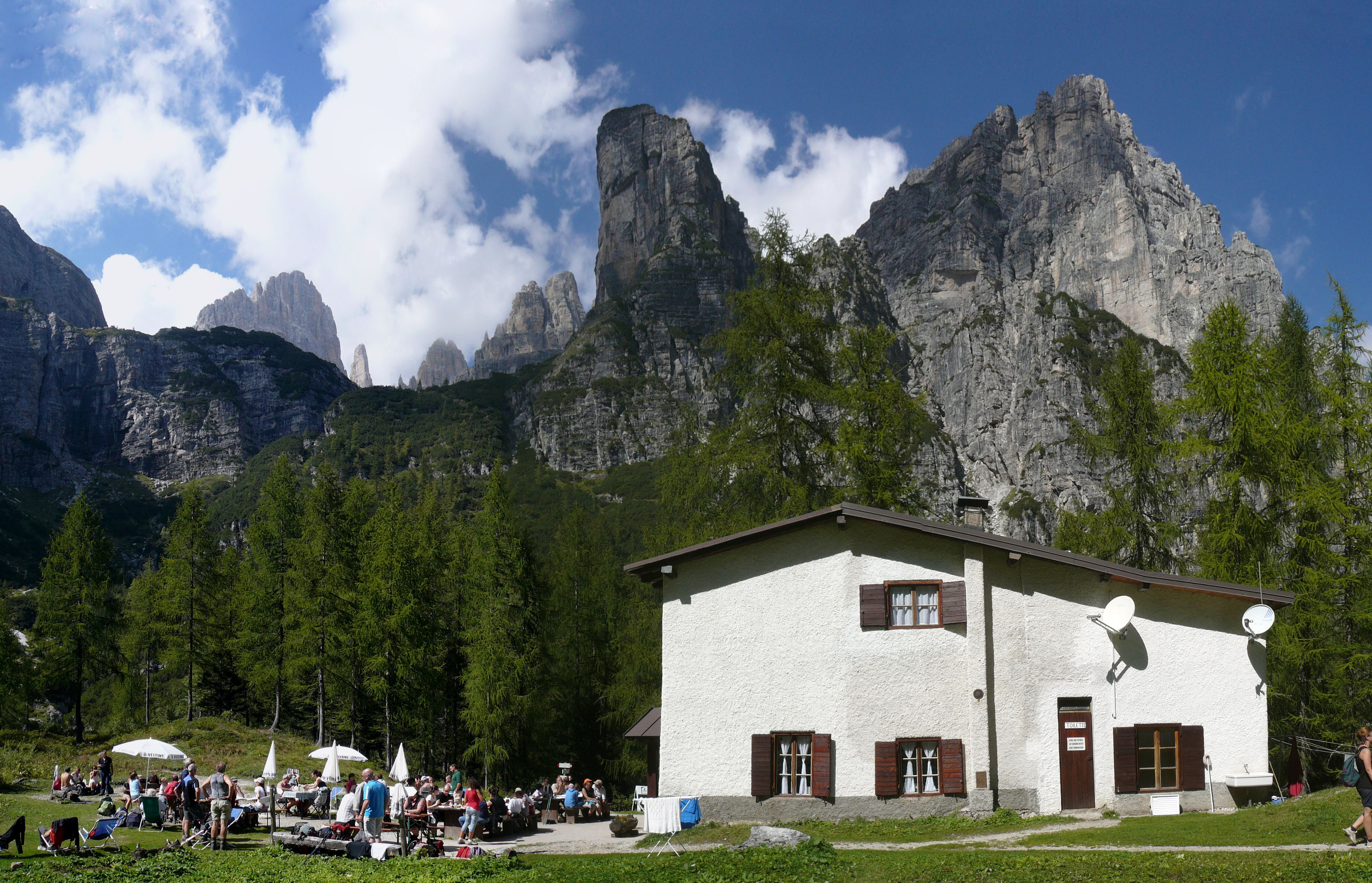 Rifugio Selvata nel Gruppo del Brenta